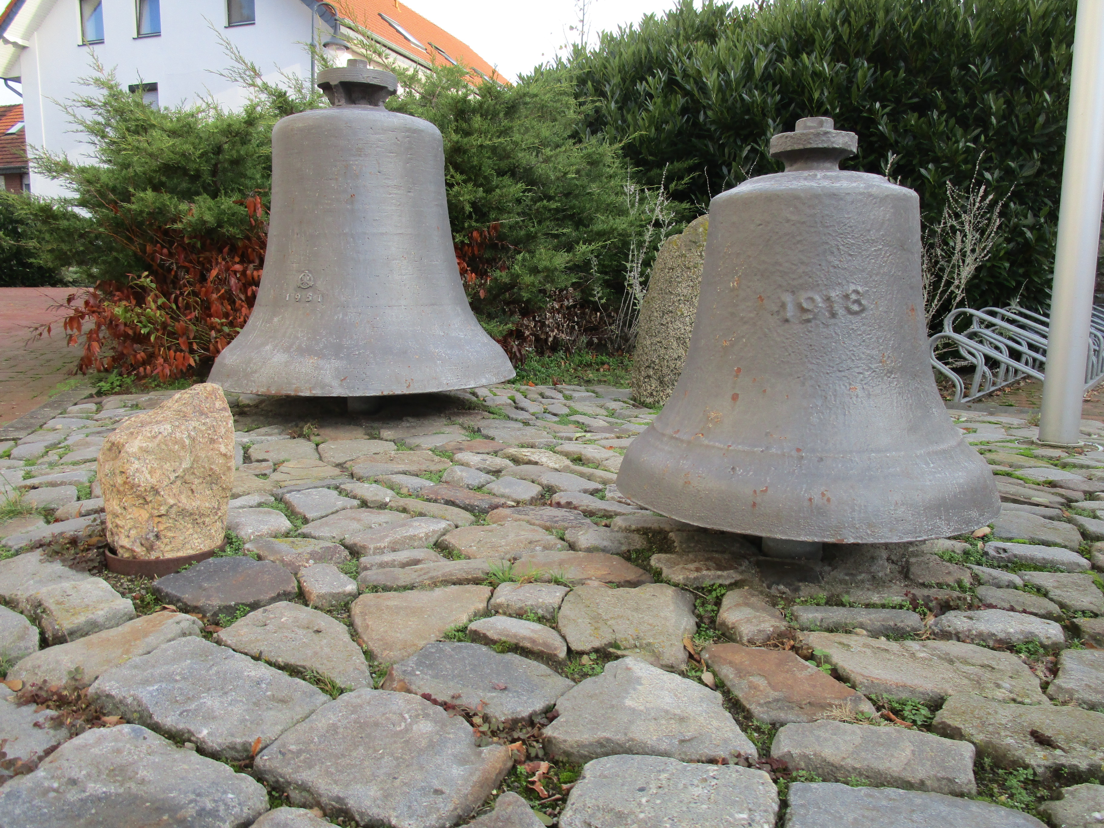 Die Sankt Matthäuskirche in Hunteburg ... Object location52° 26′ 16.43″ N, 8° 16′ 34.29″ E